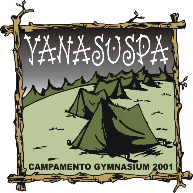 Campamento Gymansium 2001 Autor: Sexto año 2001 Gymnasium UNT